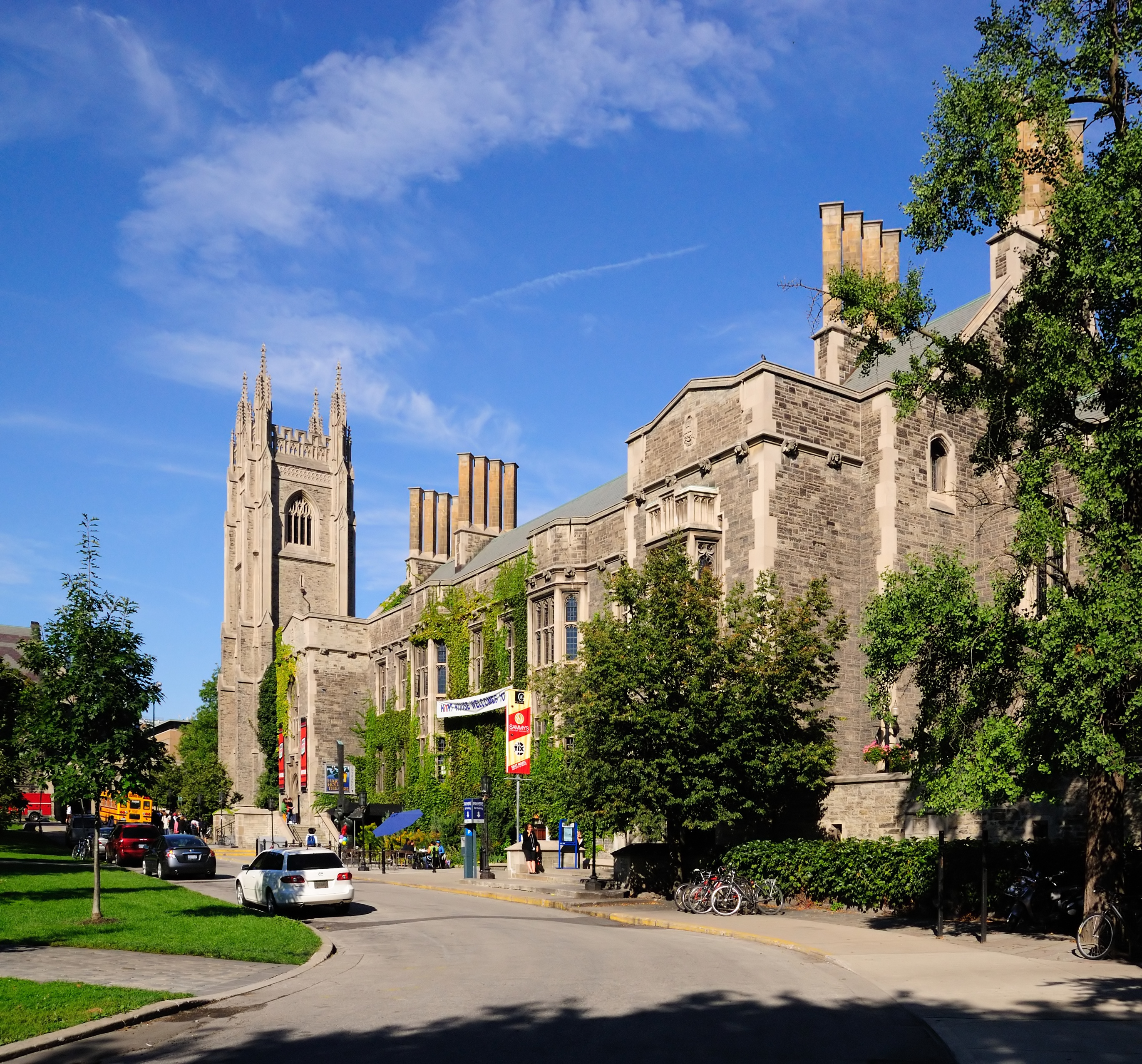 Toronto: Hart House (Studentenzentrum der Universität Toronto am St. George Campus)